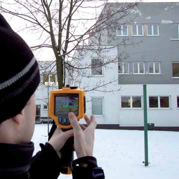 Termovize